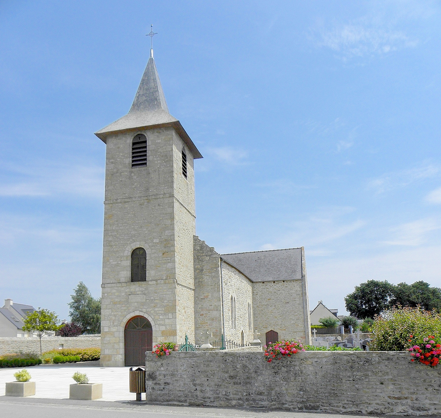 Église Saint-Pierre et Sainte-Agnès de La Landec (22).